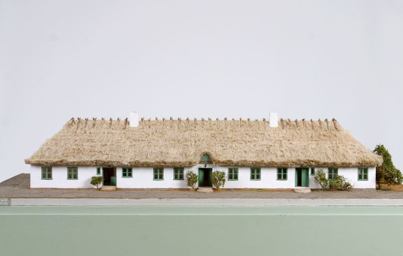 Modell av värdshuset Bödkaregården i Malmö, tillverkad 1957 av Inga-Brita Nordin. Modellen finns på Malmö museum.